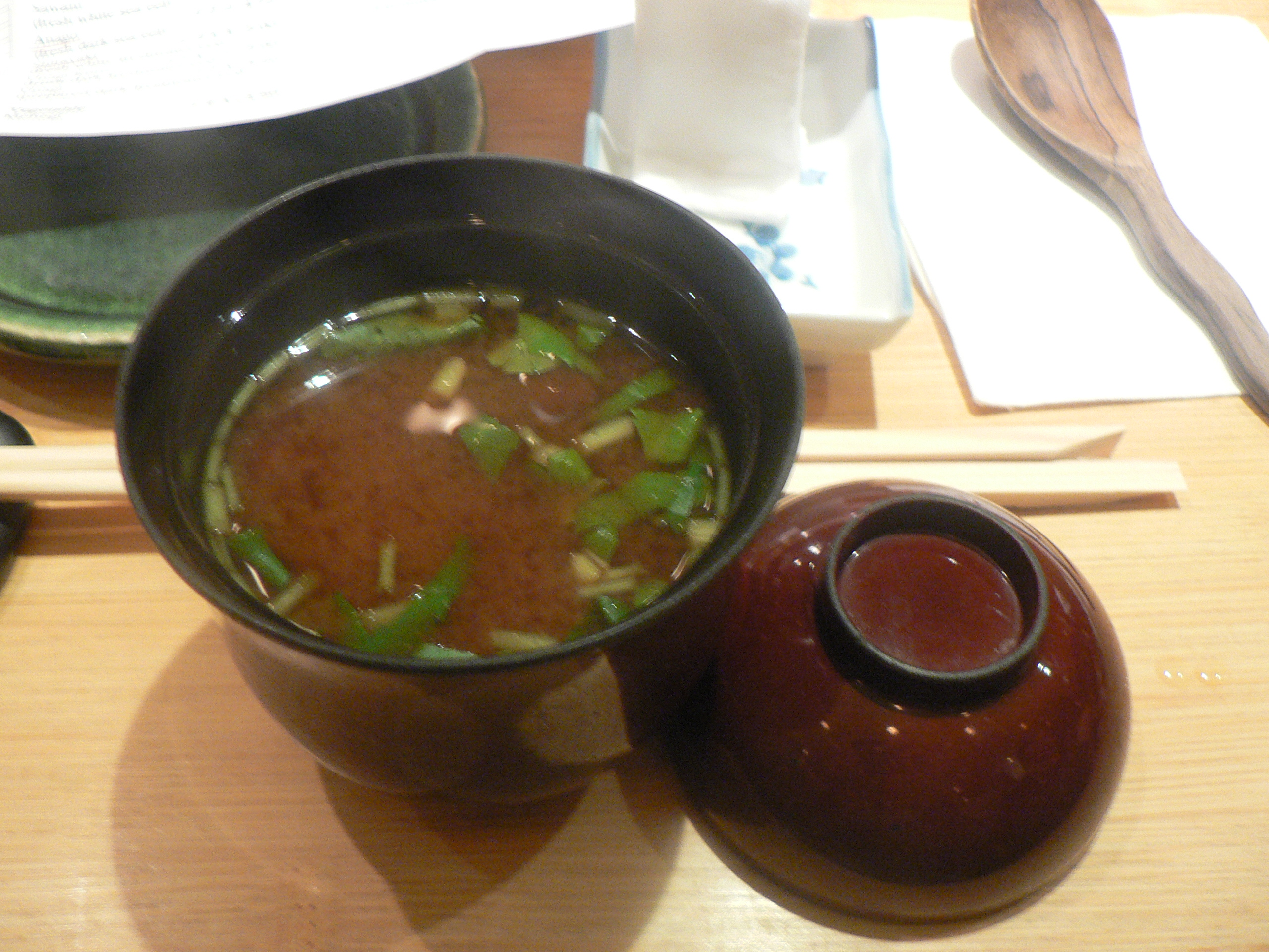 赤だし.